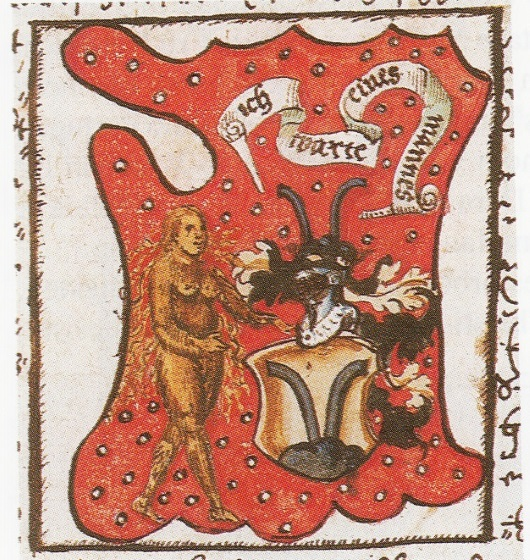 Das Eisenberger alt wappen - Conterfeey einer alten Tartschen - Symbolium "ich warte eines mannes"